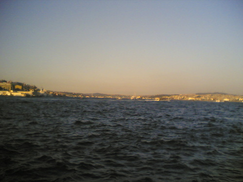 Eminönü'nden Boğaziçi manzarası.